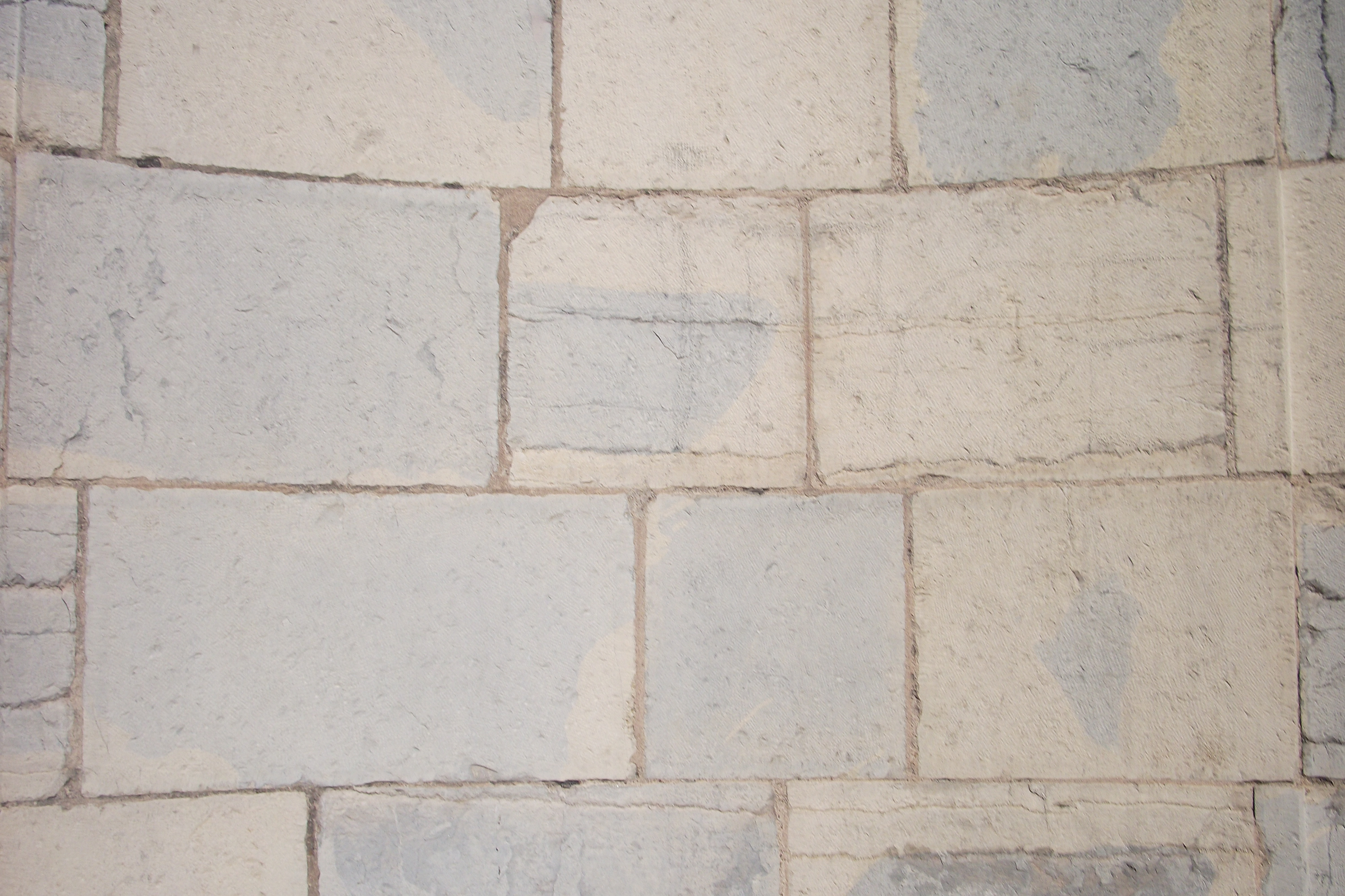 Un mur de l'hôtel Thomassin de Vesoul (Haute-Saône, Franche-Comté)